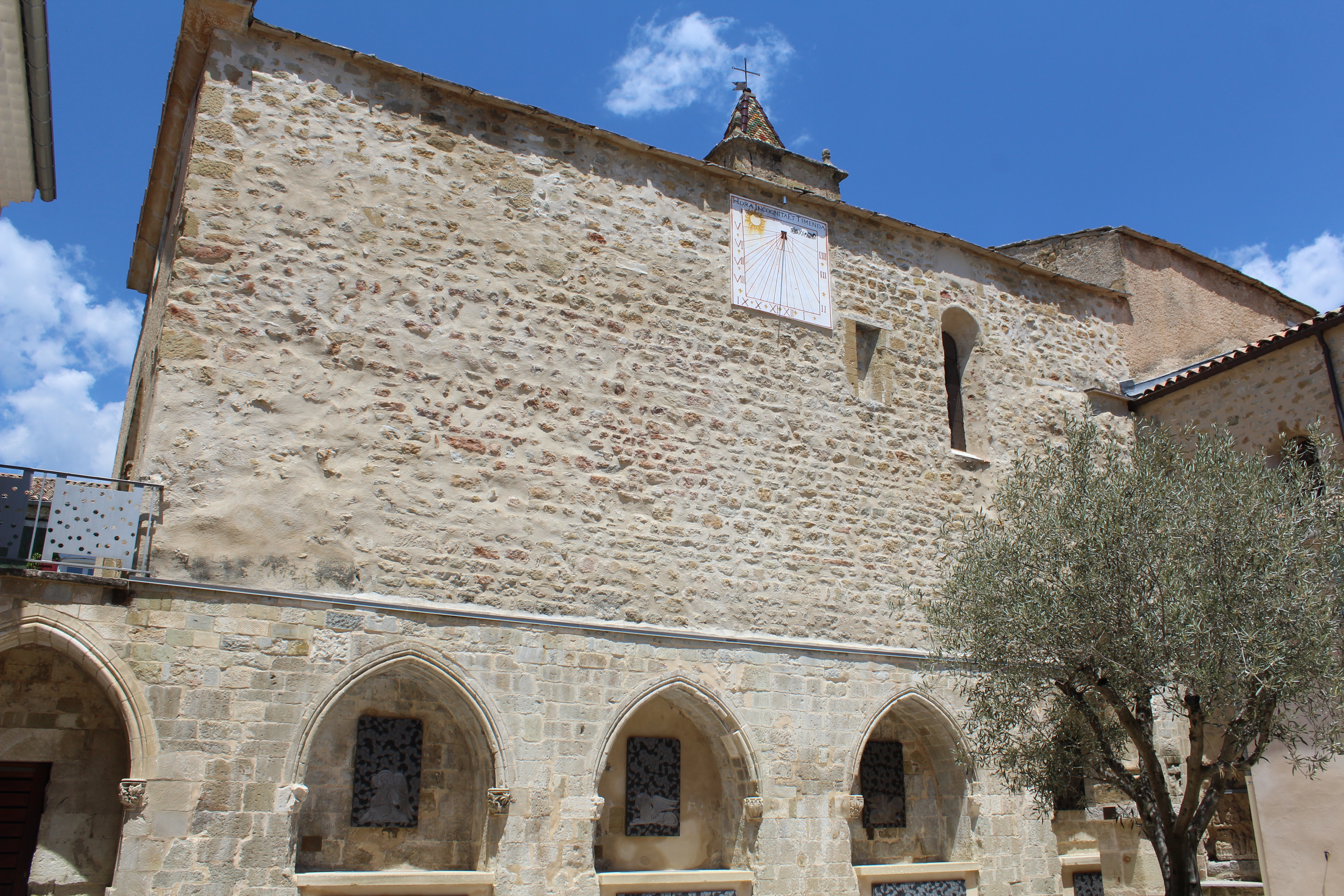 Cloître de l'ancienne abbaye Saint-Martin de Cruis.